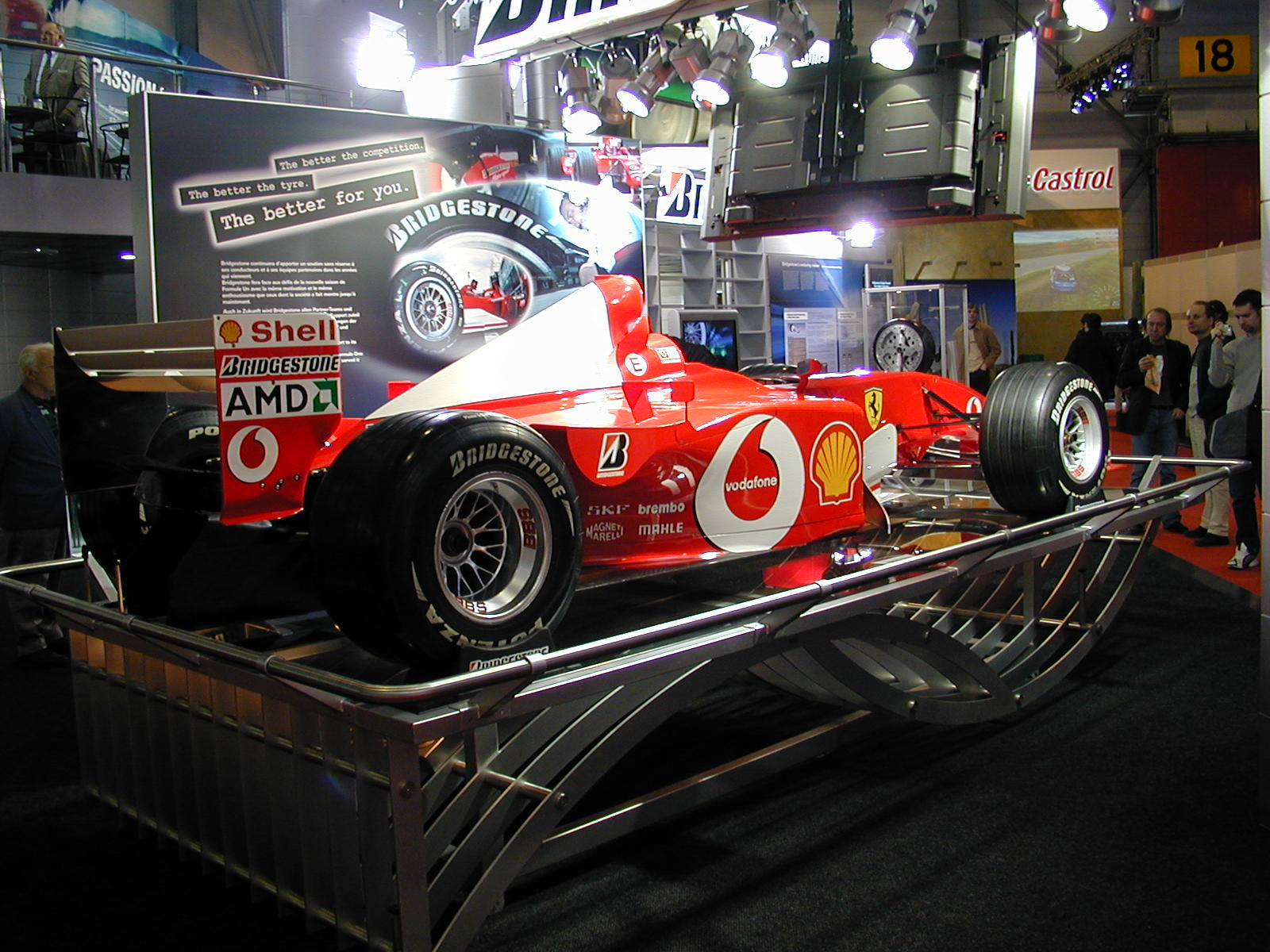 Salon de Genève 2004 SAG2004 193 Ferrari F1 de Schumacher - F2003-GA